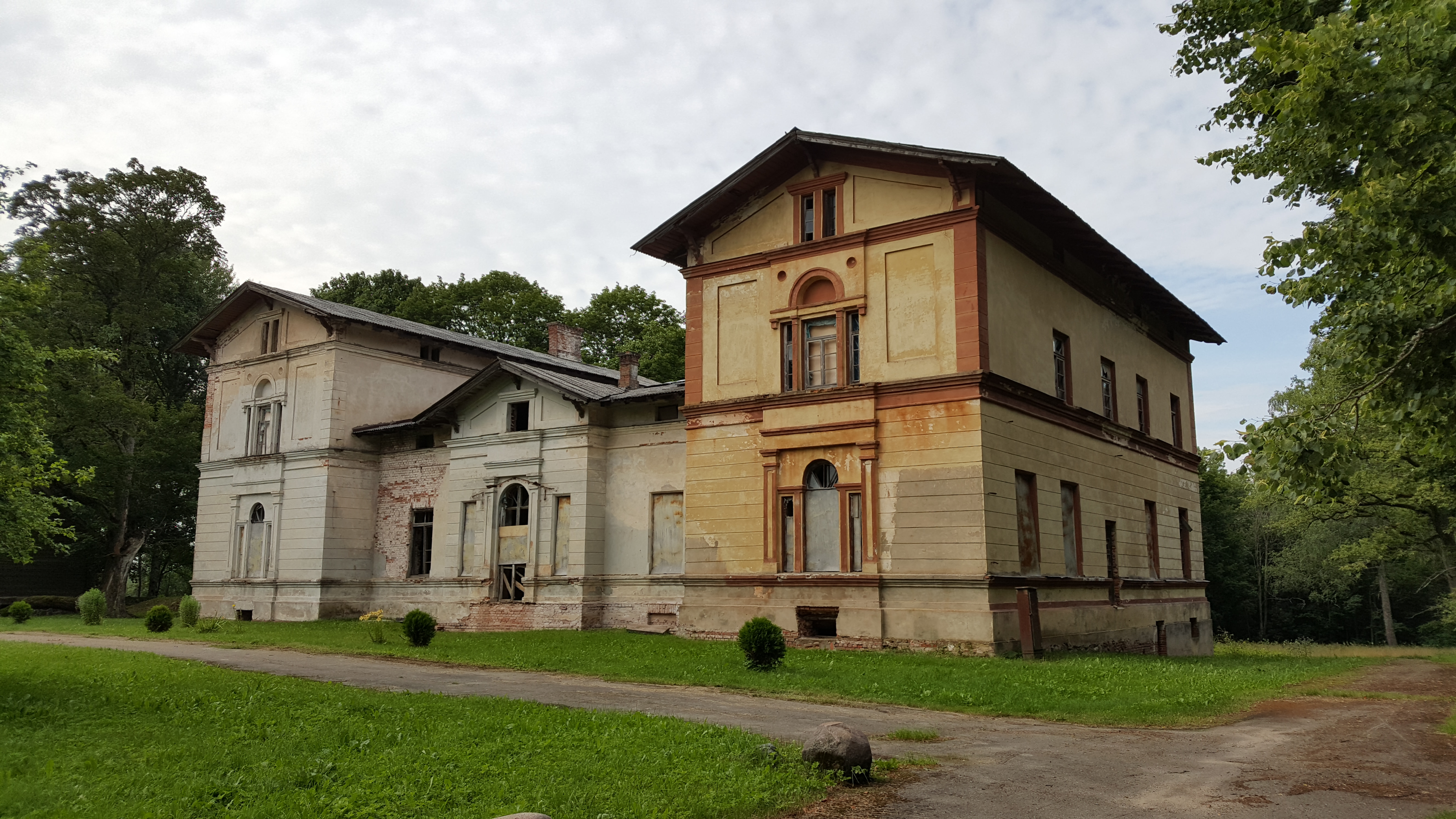 Vērene mõisa peahoone